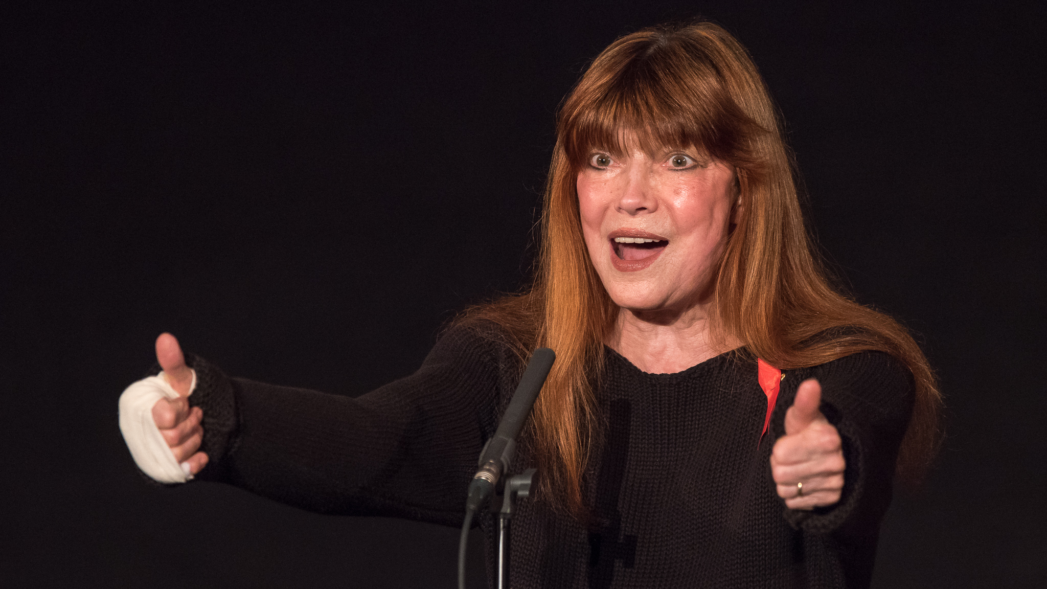 Bürgerhalle,Concertbüro Franken,Karin Ilse Überall,Katja Ebstein,Konzert,Livekonzert,Livemusik,Musik